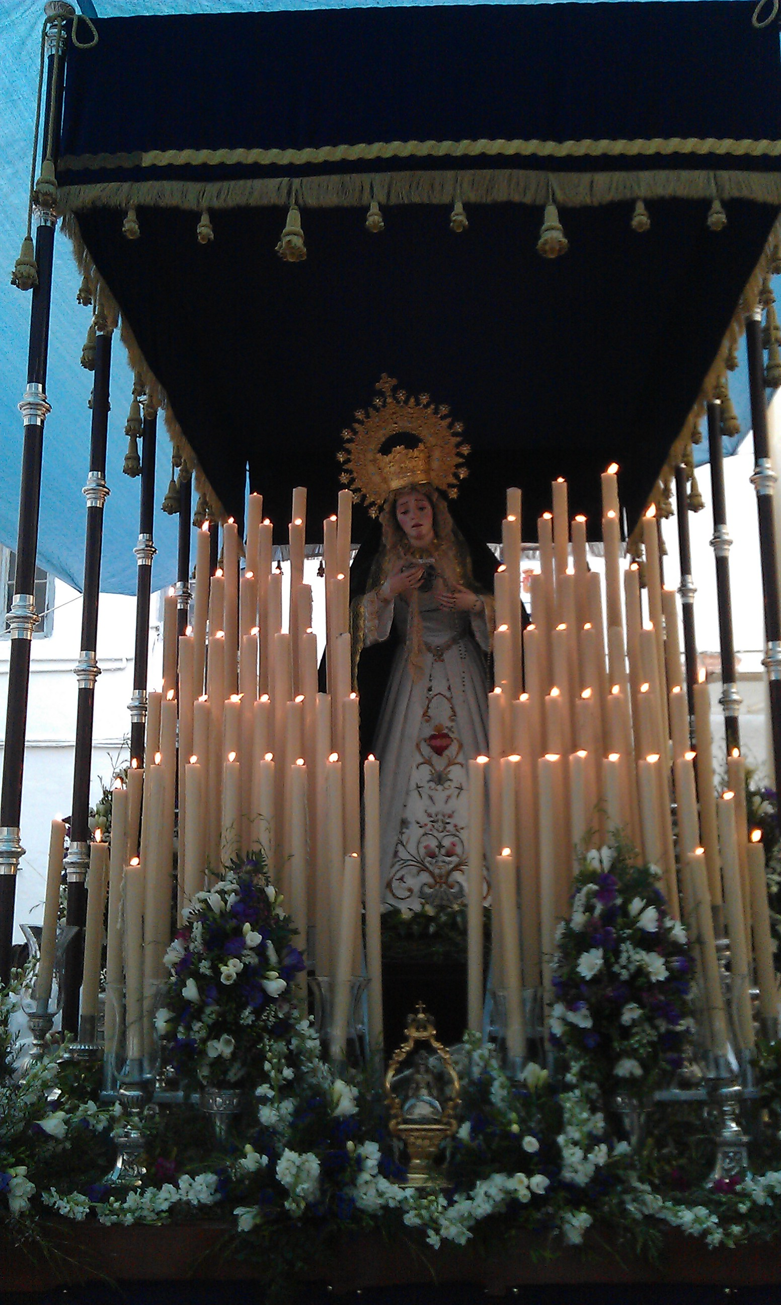 Viren de Esperanza y Refugio de los Ancianos, obra de Manuel Borrego.